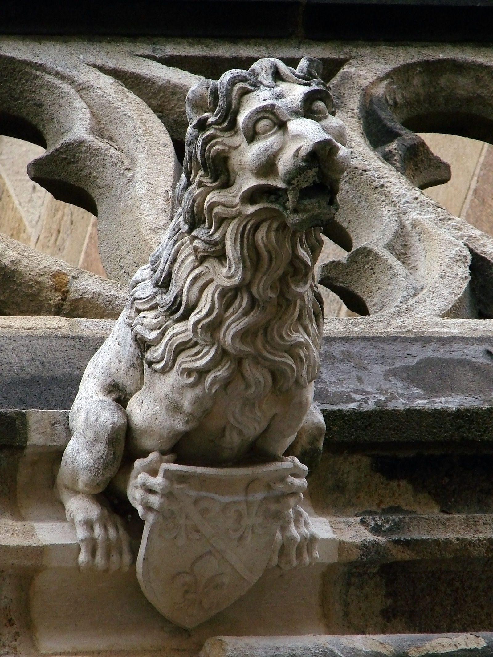 Gargouille de la cathédrale Notre-Dame de l'Annonciation de Moulins.